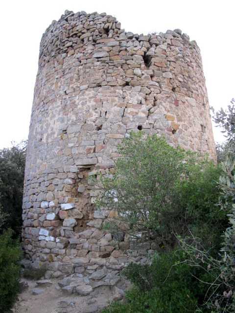 Castell de Montornès o de Sant Miquel a la comarca del Vallès Oriental - Catalunya